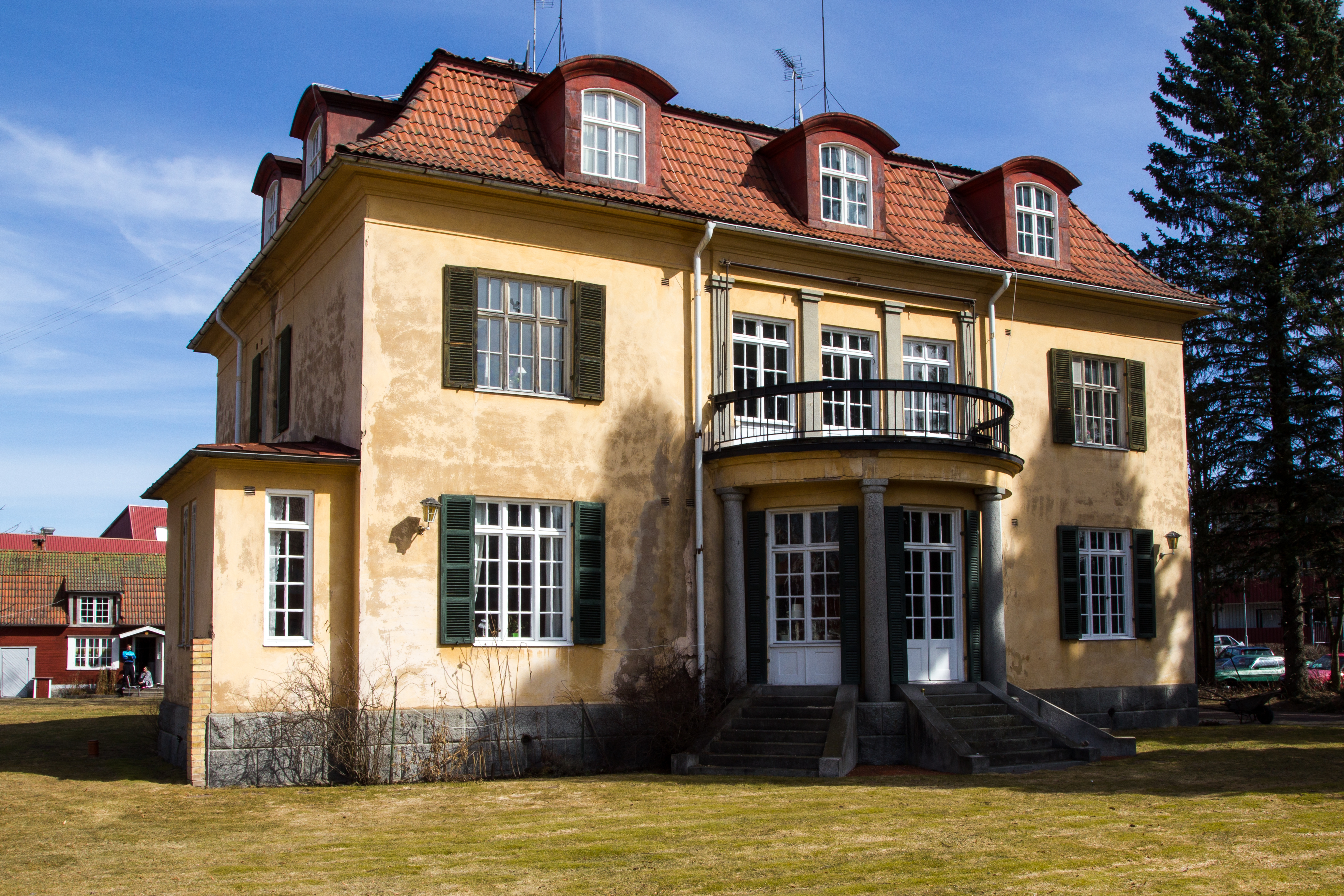 Haffnerska villan, Hedemora, Sverige. Ursprungligen disponentbostad för Stora Långviks gruvaktiebolag.